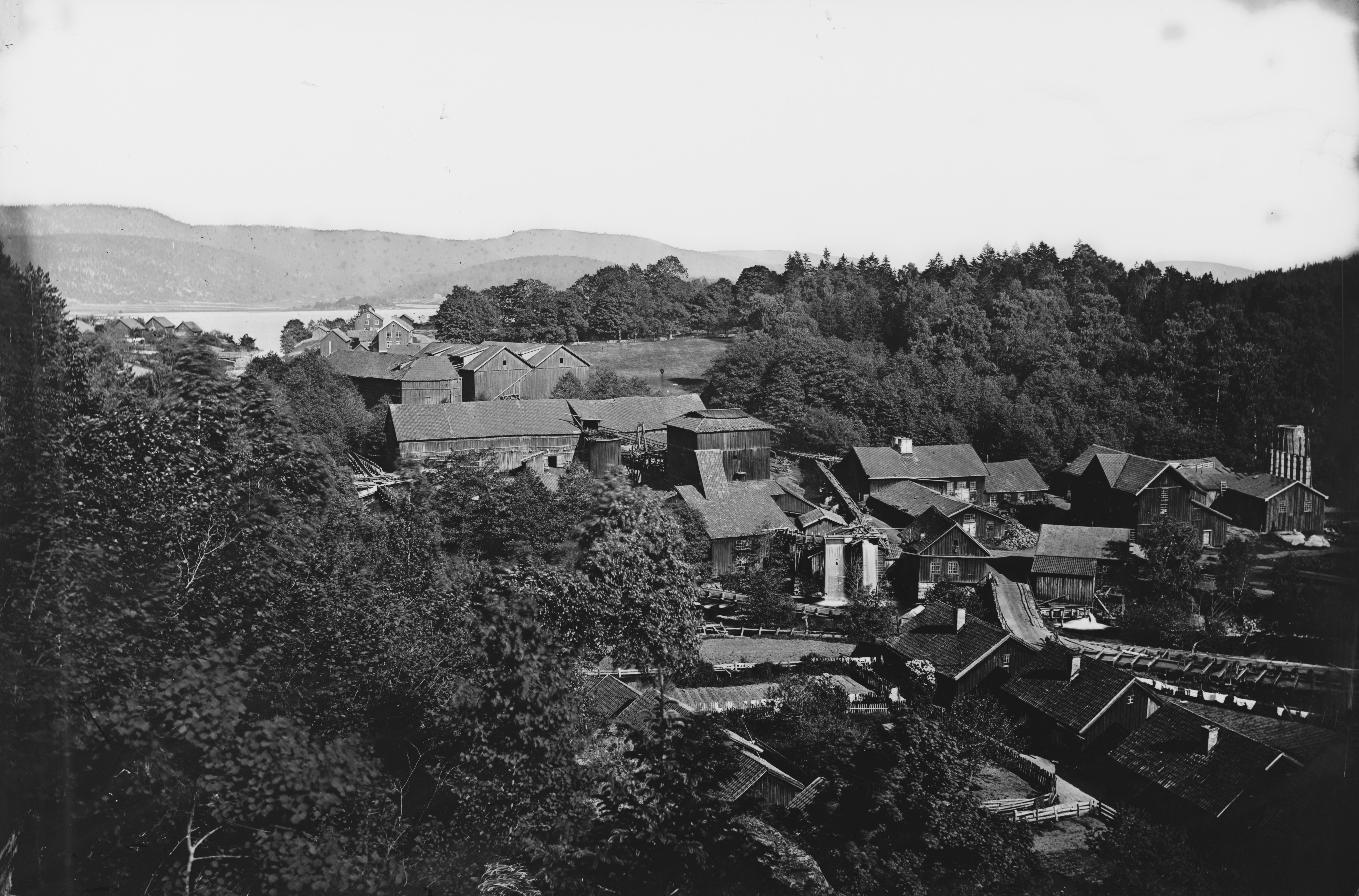 Sted: Eidsfoss Kommune: Hof Fylke: Vestfold Tagger